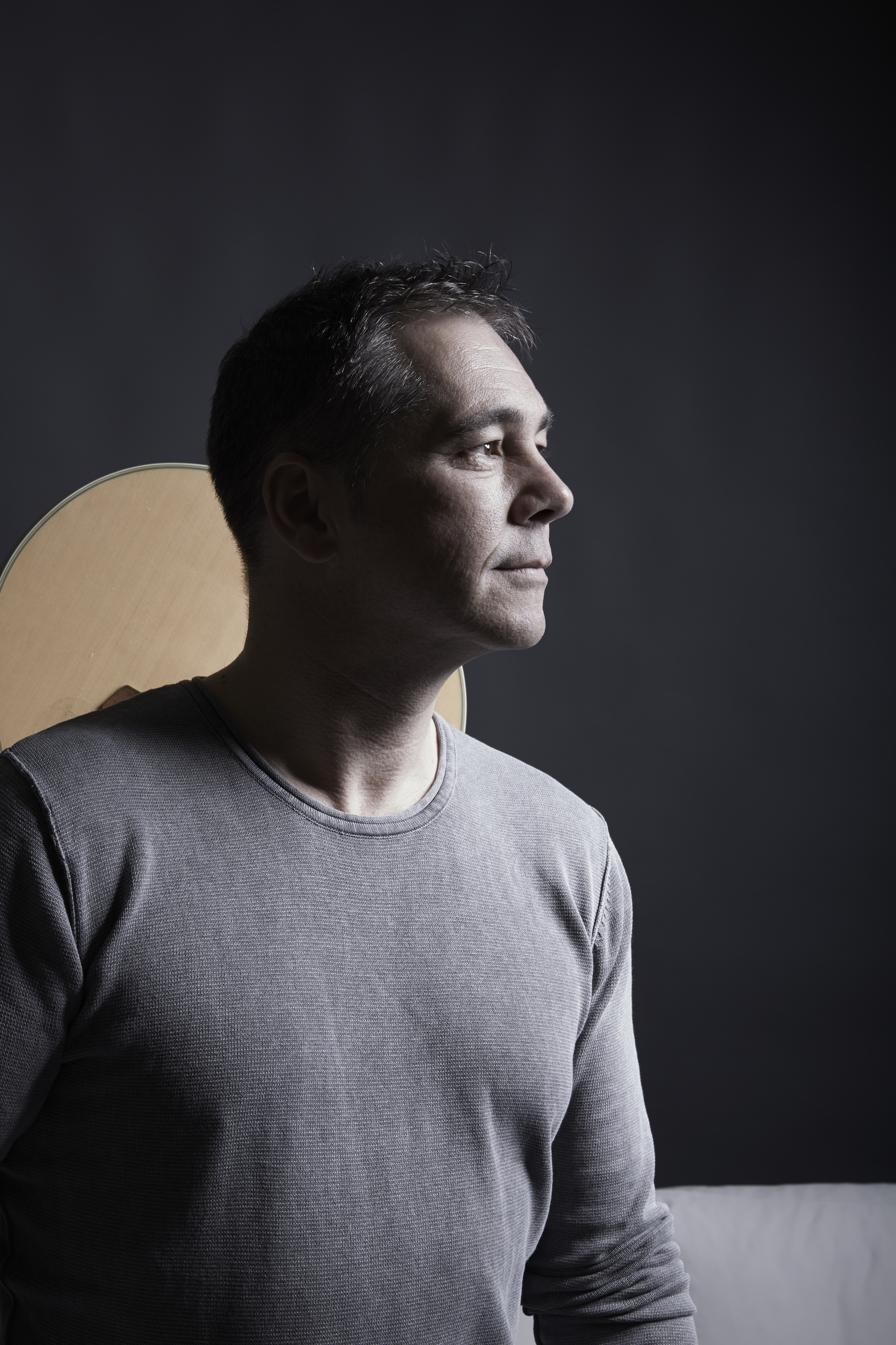 Foto von Michael Spleth